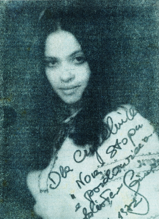 Zdzisława Sośnicka na okładce nieistniejącego polskiego magazynu muzycznego „Non Stop” (jeszcze jako dodatek do „Tygodnika Demokratycznego”), nr 4 sierpień-wrzesień 1972.